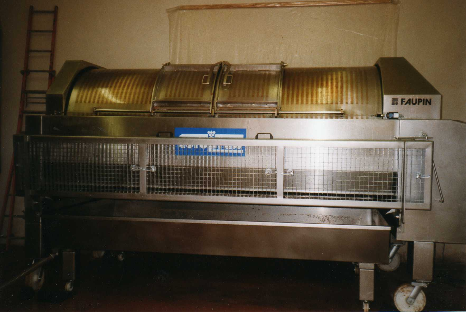 Presoir servant lors des vinifications